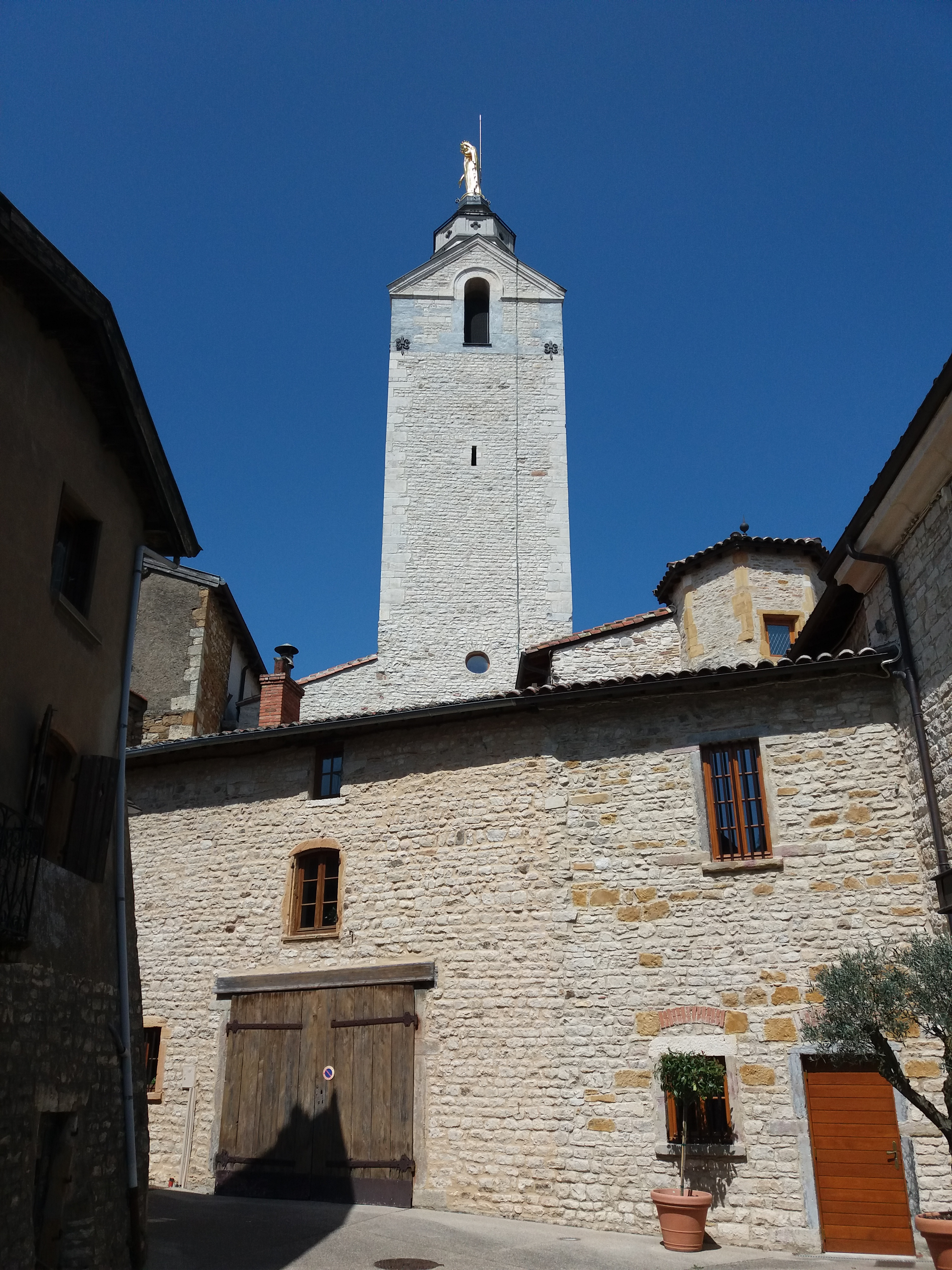 Beffroi de profil.